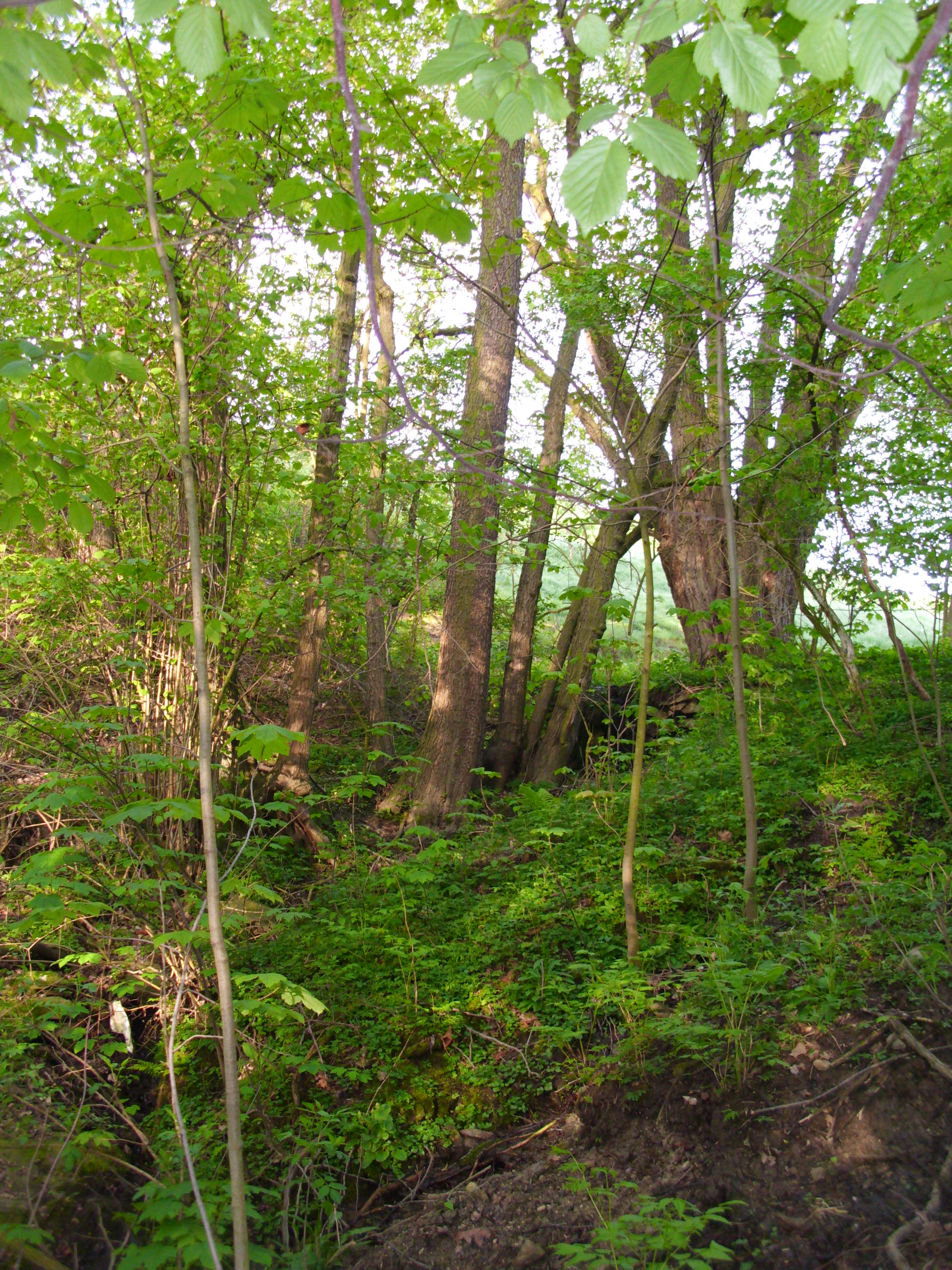 Dieser Grund ist ein Seitental der Roten Weißeritz und steht teilweise unter Landschaftsschutz